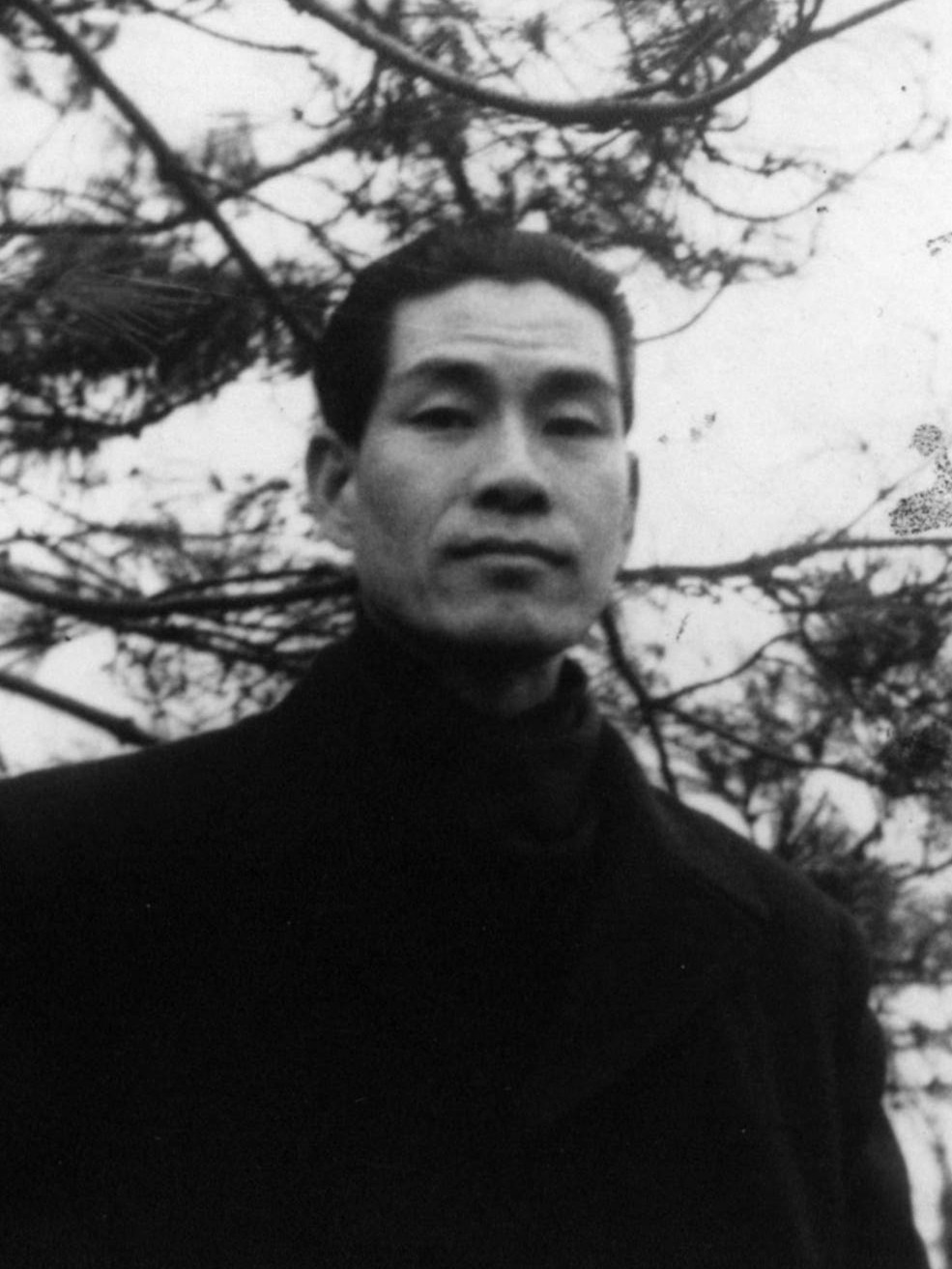 1950年代曹漫之摄于上海